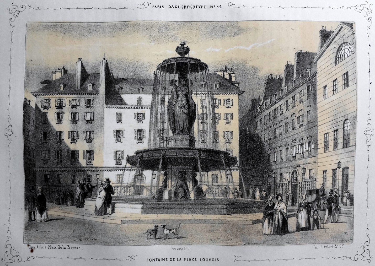 Fontaine de la Place Louvois, avant la plantation de la végétation de l'actuel square.